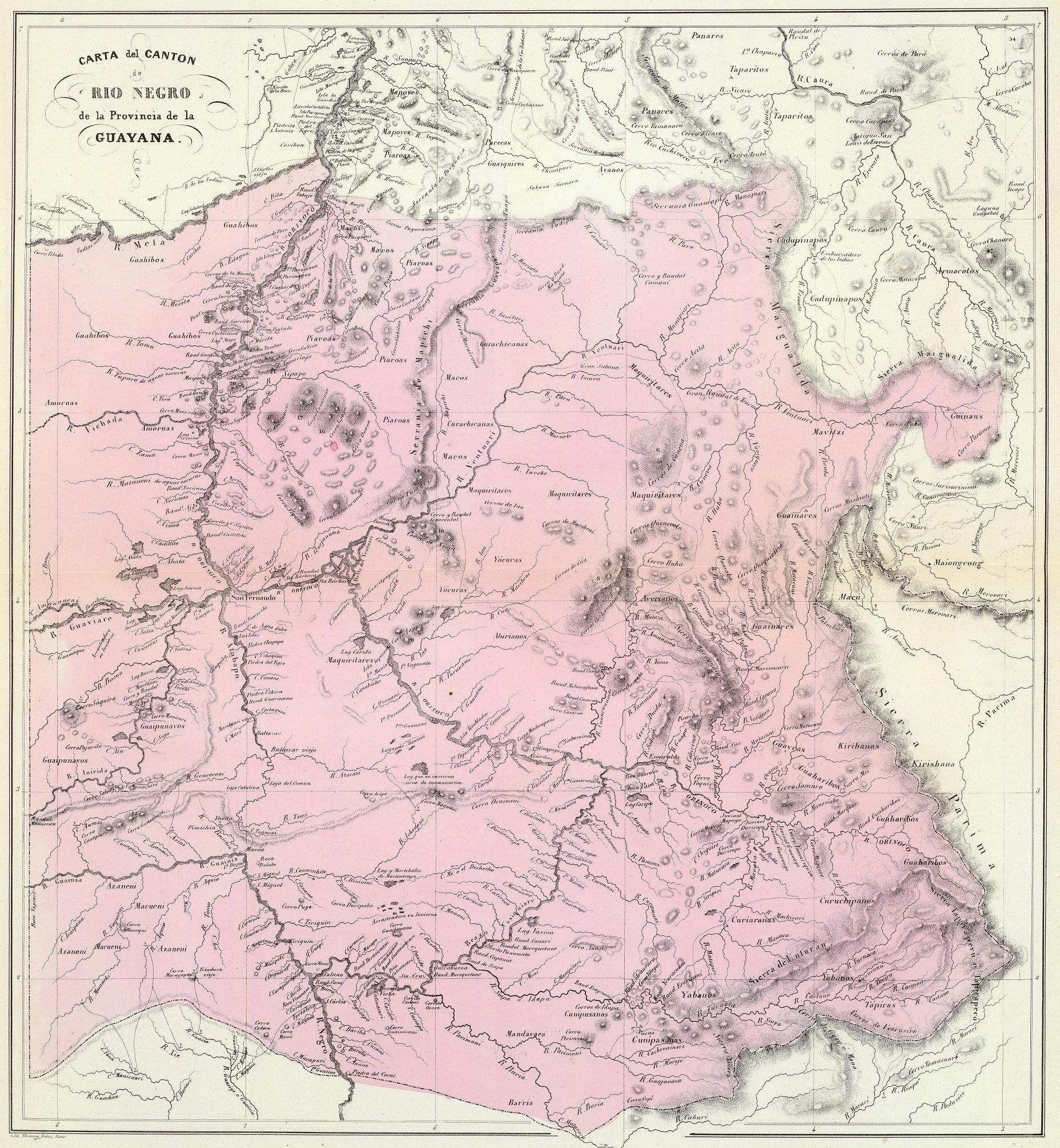 Cantón Rionegro de la Provincia de Guayana. Tomado del "Atlas físico y político de la República de Venezuela", 1840.